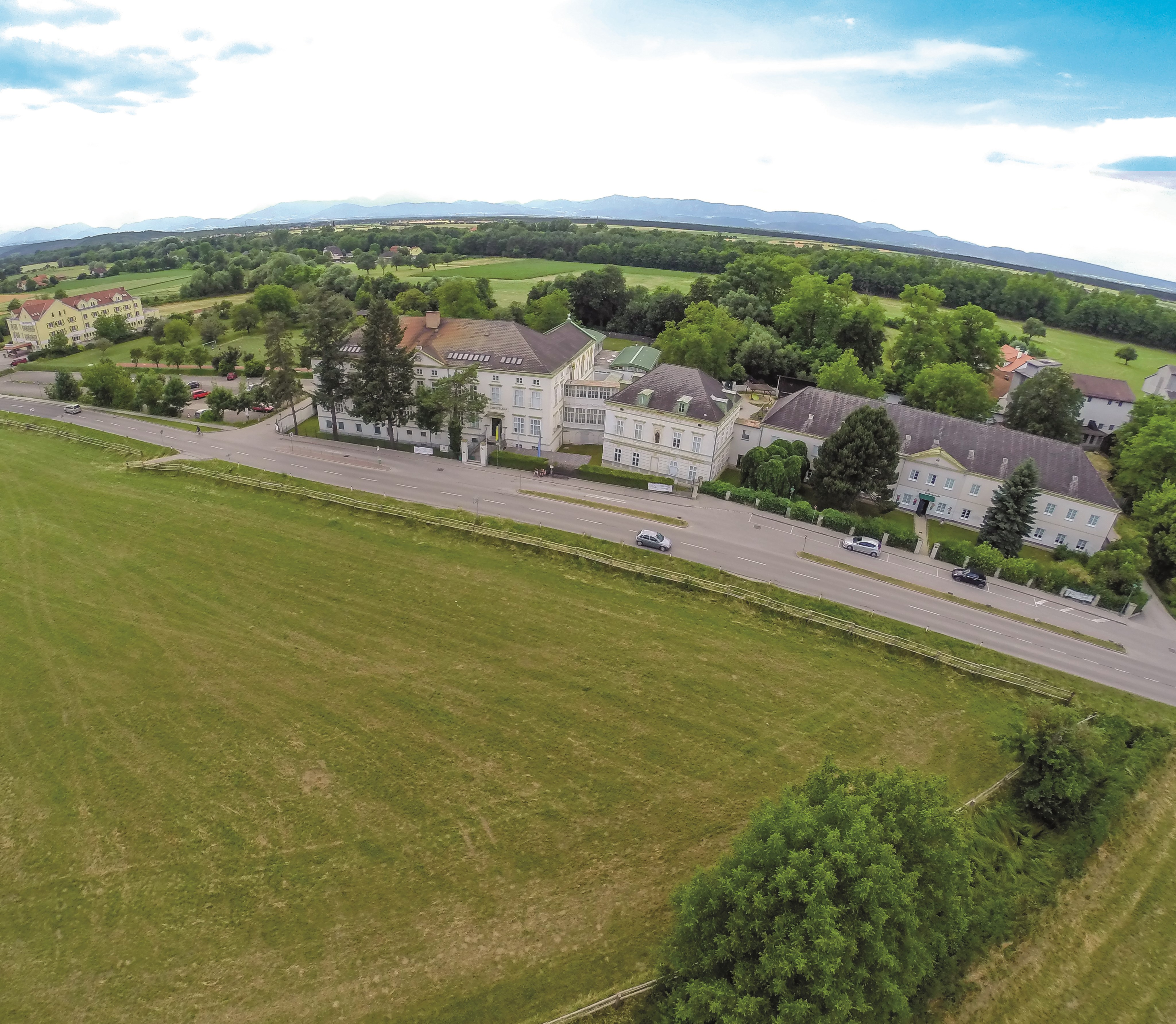 Flugaufnahme der Schule in Frohsdorf, Lanzenkirchen, Österreich